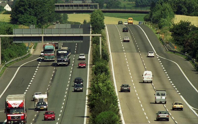 Bonn, 23.7.1991 Ferienverkehr auf der Autobahn bei Bad Honnef.